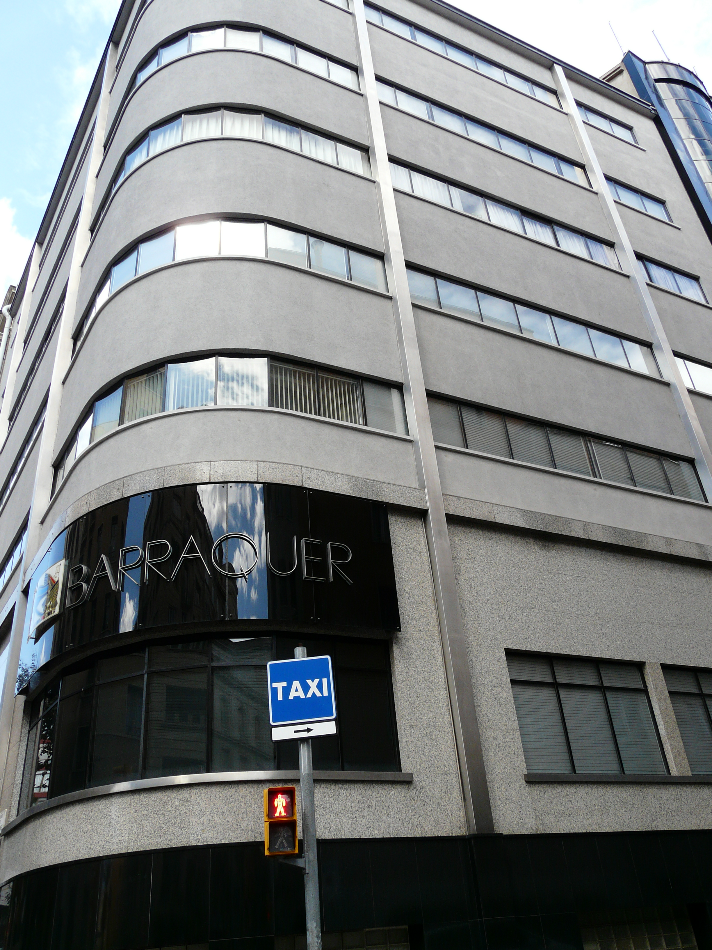 Institut Oftalmològic Barraquer (Barcelona) del arquitecto Joaquim Lloret i Homs